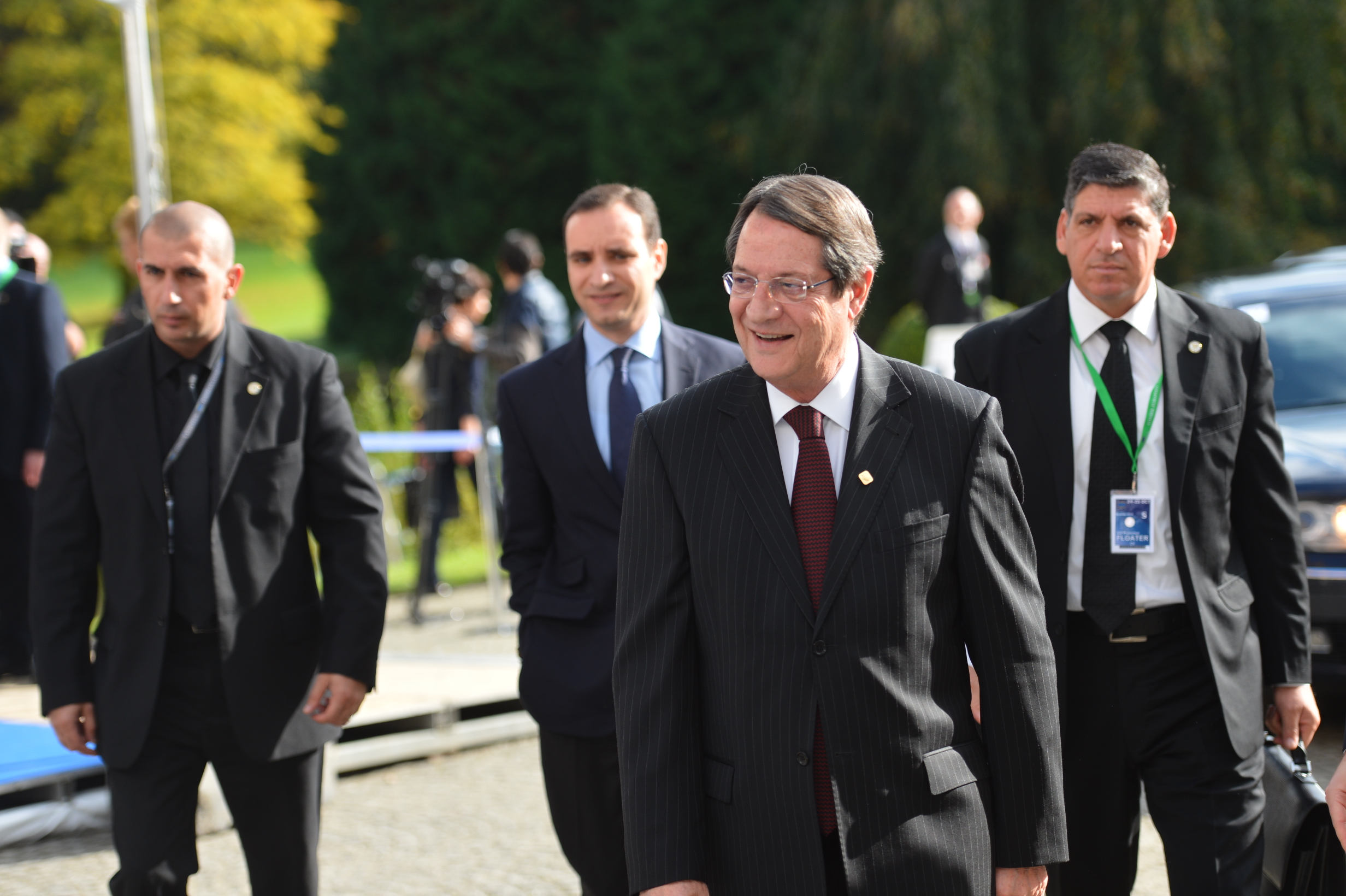 EPP Summit, Meise. Oct. 2013